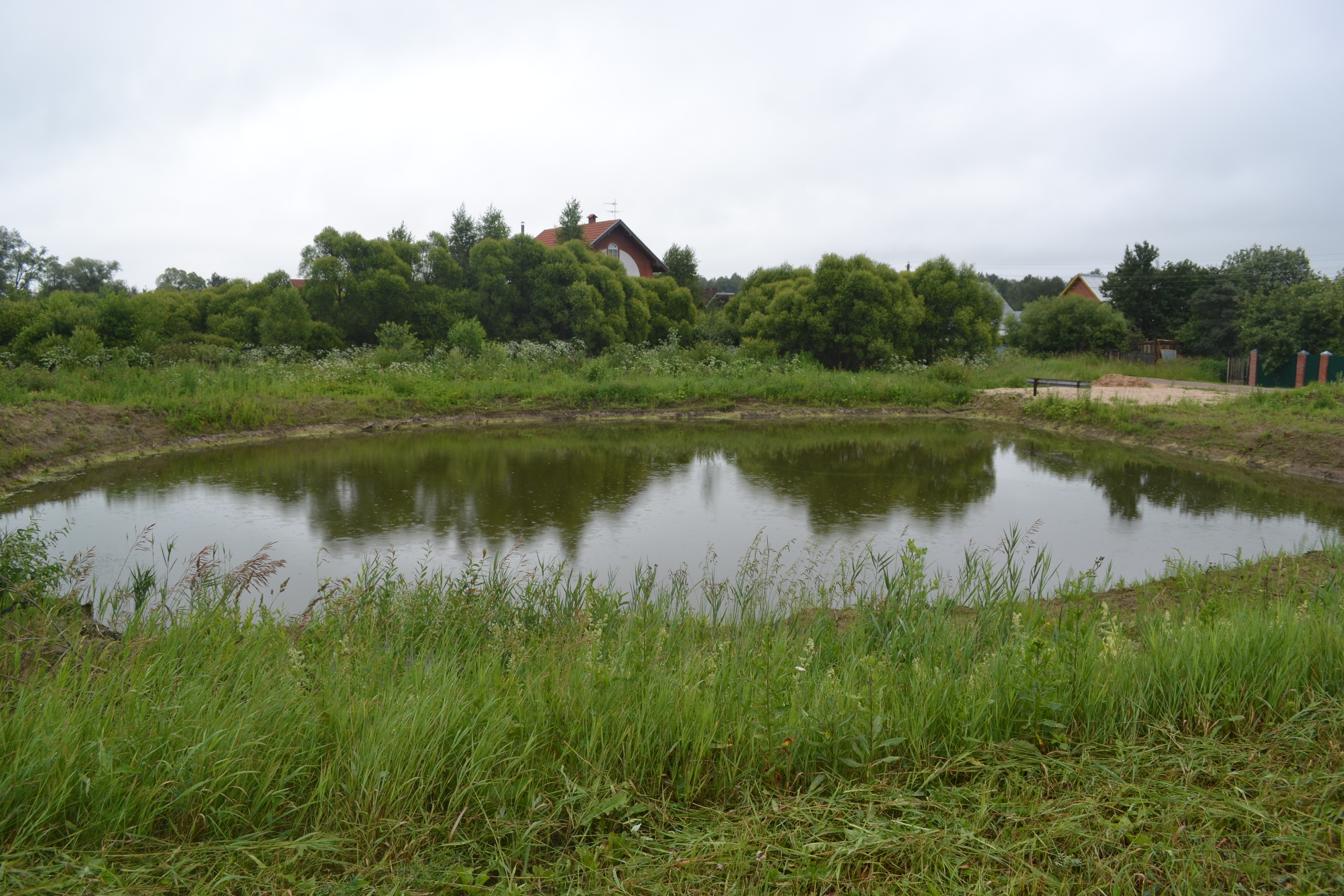 Пруд в деревне Сычи (Шатурский район)